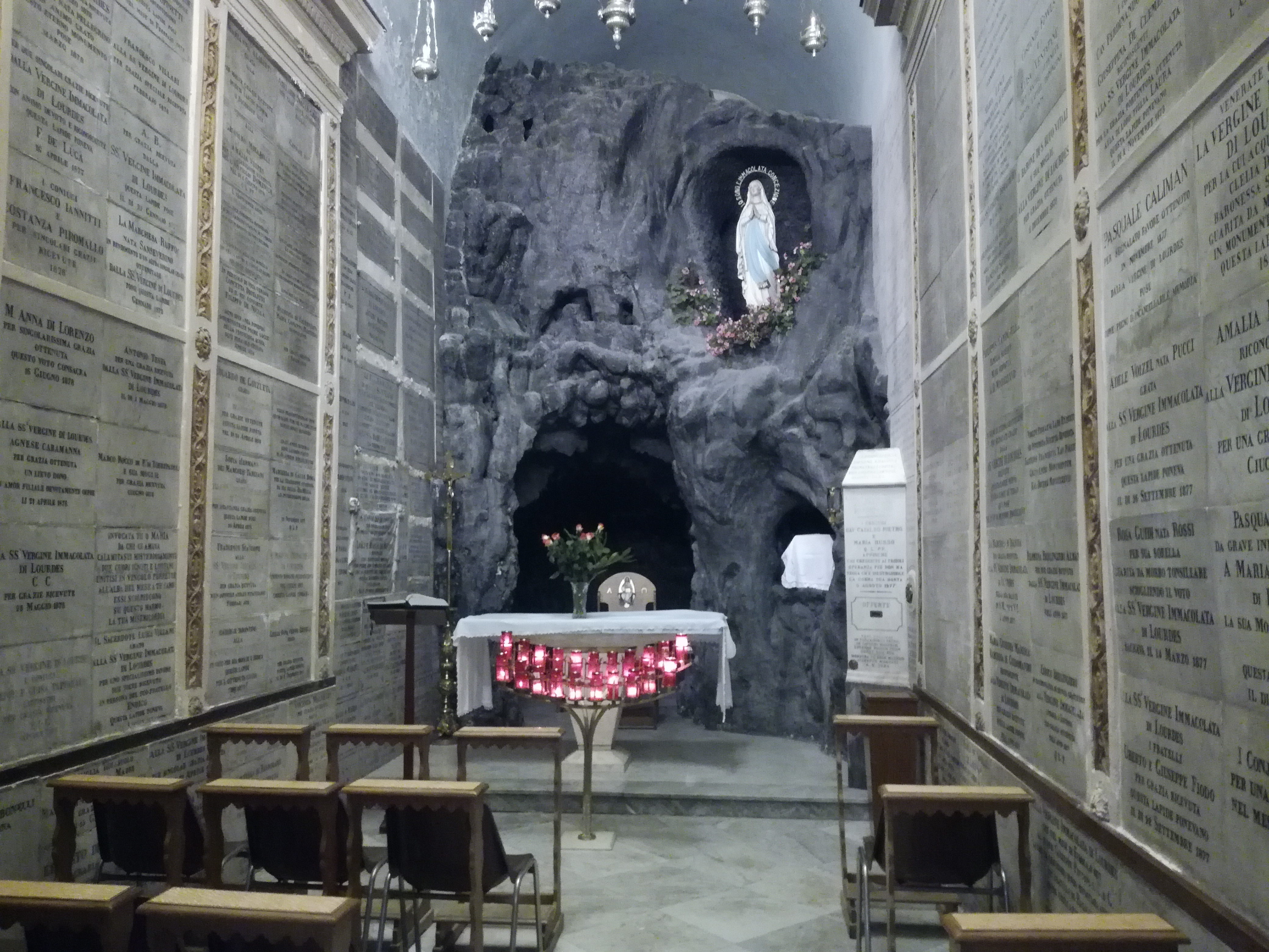 Grotta di Lourdes Nicola da Tolentino